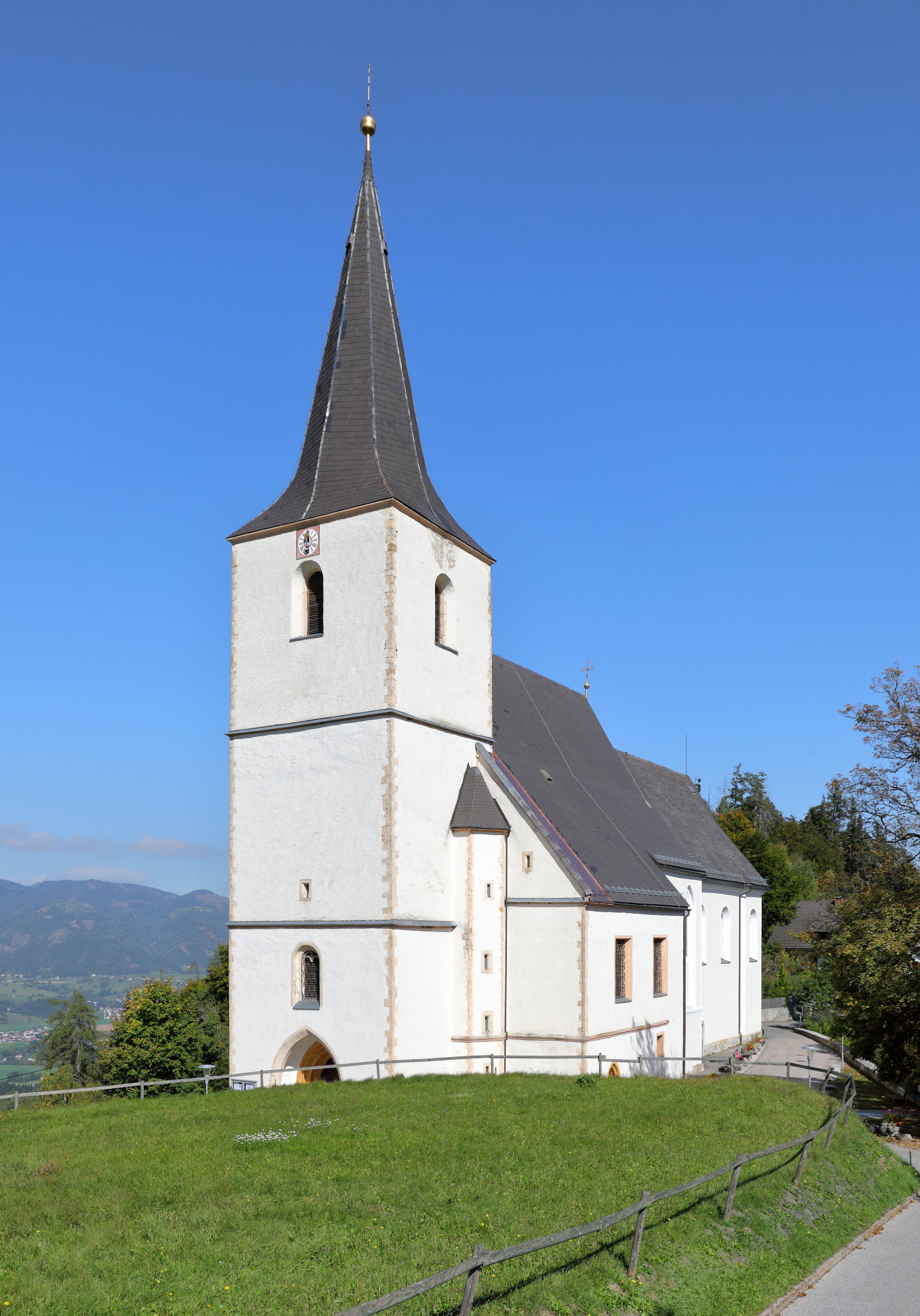 Südansicht der röm.-kath. Pfarr- und Wallfahrtskirche Maria Rehkogel in Frauenberg, ein Ortsteil der steirischen Marktgemeinde St. Marein im Mürztal. Die Kirche wurde von 1489 bis 1496 errichtet und 1769 mit einem barocken dreijochigen Chorraum erweitert.